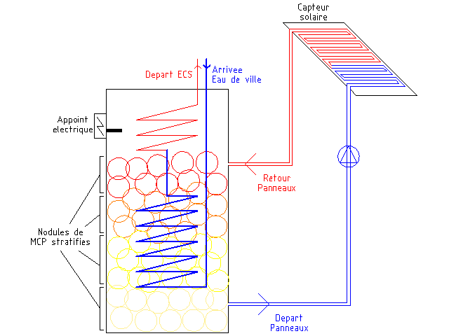 Schéma de principe d'un système solaire comprenant : -un ballon accumulateur à stratification par Matériaux à changement de phase -un capteur solaire plan -un échangeur tubulaire de chaleur côté Eau Chaude Sanitaire